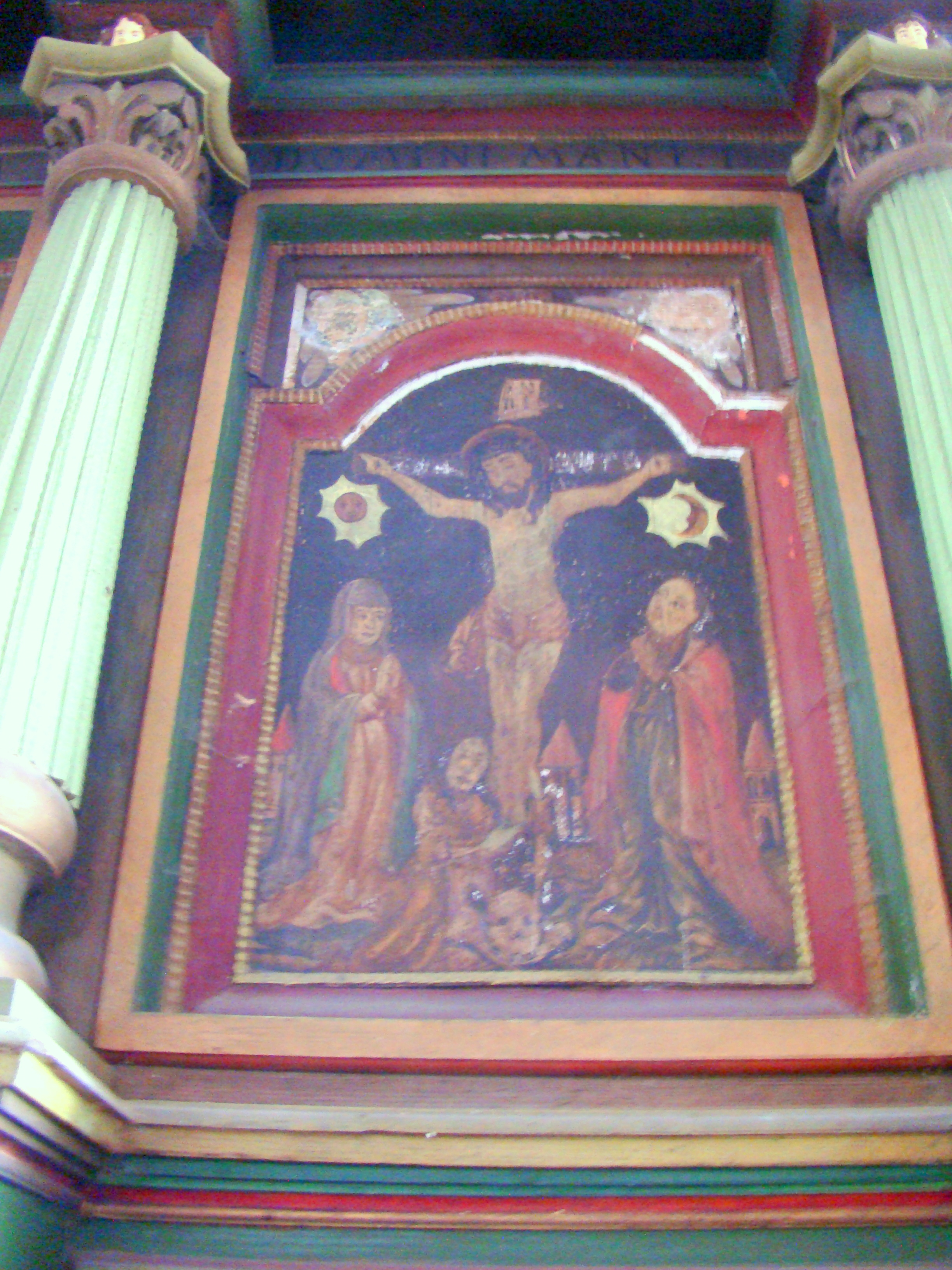 Ansamblul bisericii evanghelice, sat Ormeniș; comuna Viișoara Str. Principală 204 sec. XVI - XVIII